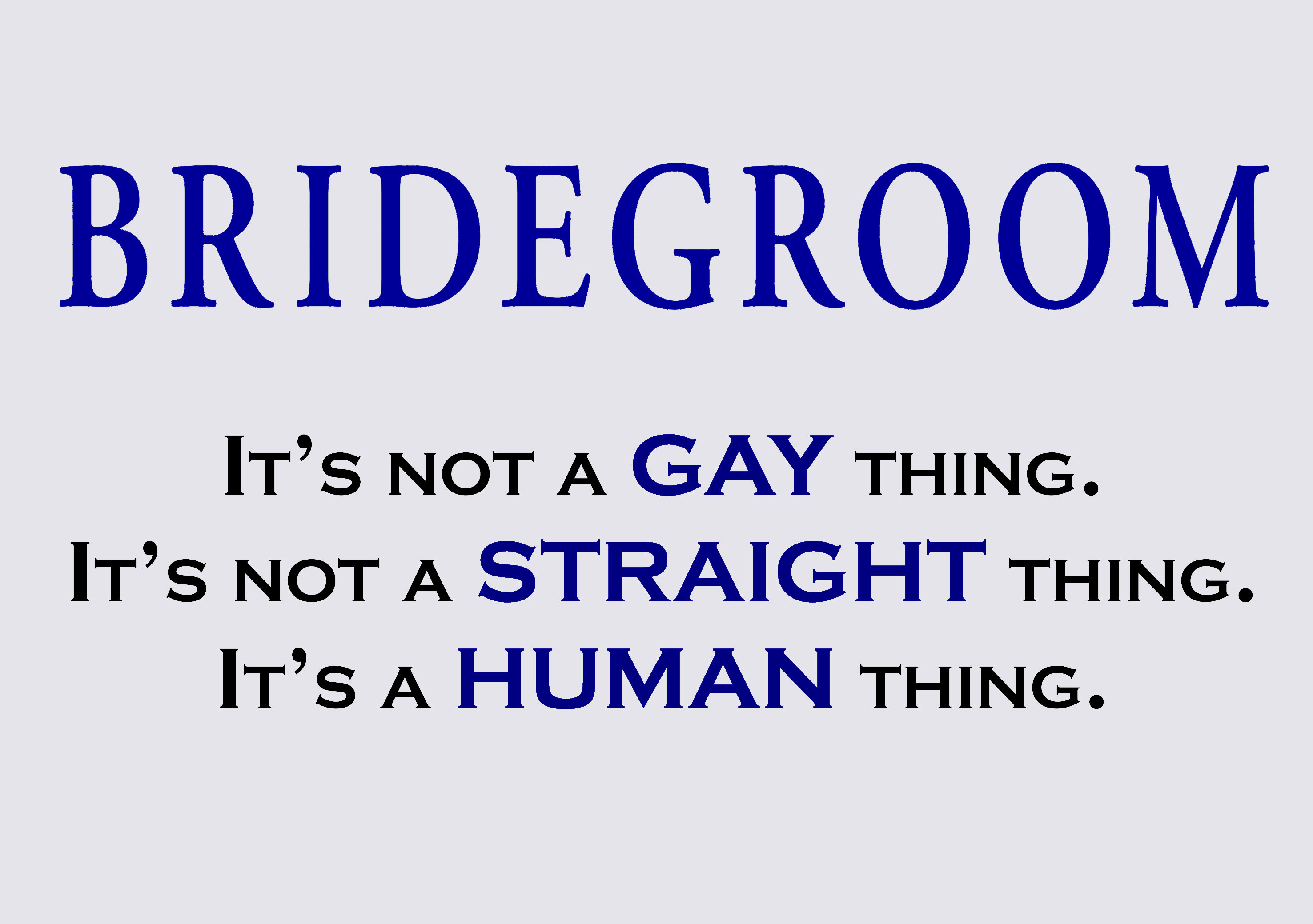 Visuel de la page "Bridegroom (film)" d'après le titre du film et une de ses devises.